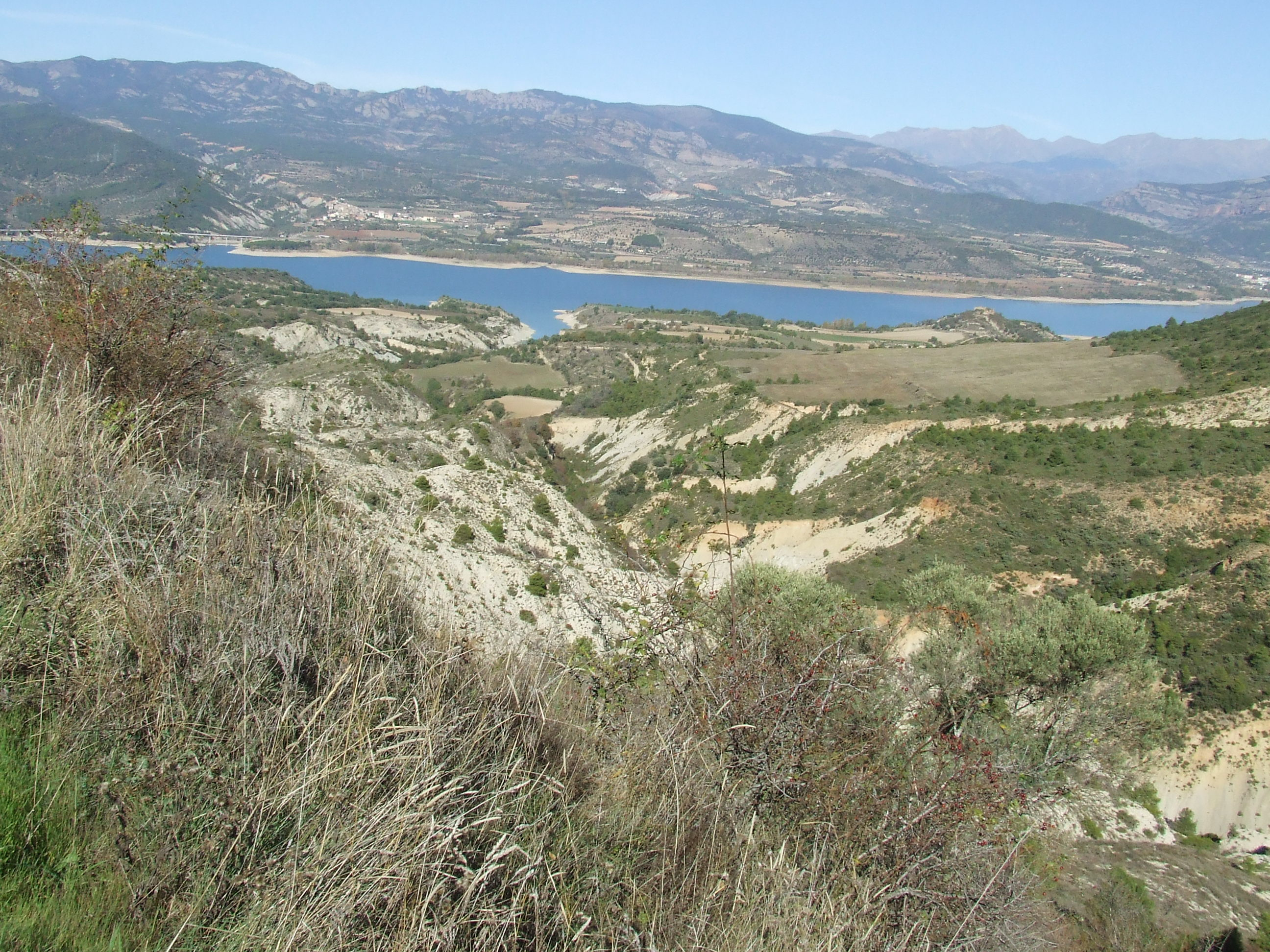 Barranc de la Podega, part alta (Orcau, Isona i Conca Dellà, Pallars Jussà)